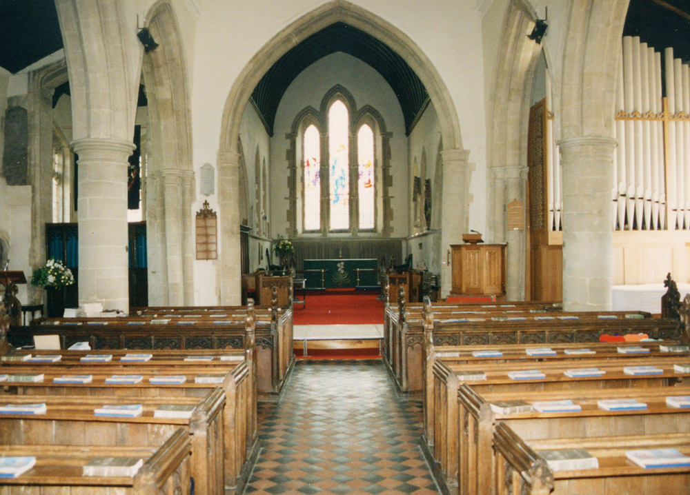 Inside the nave of St Mary the Virgin parish church, Haddenham, Buckinghamshire, looking east toward the chancel